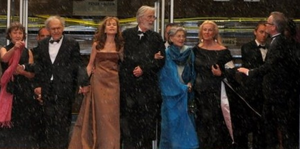 Le réalisateur et les comédiens de Amour au festival de Cannes